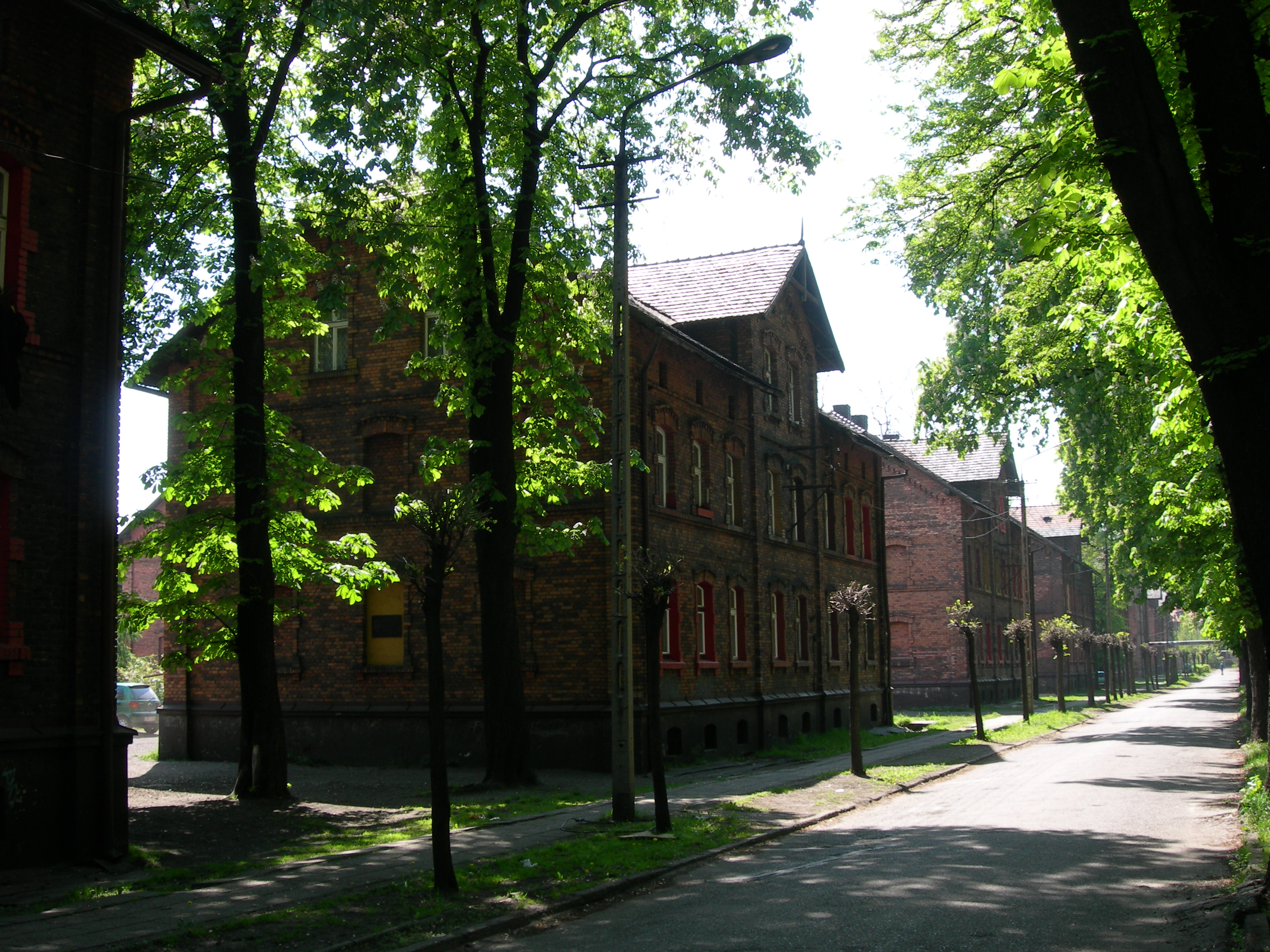 Dom przy ul. Kościuszki w Czerwionce w którym Wilhelm Szewczyk spędził dzieciństwo i młodość.